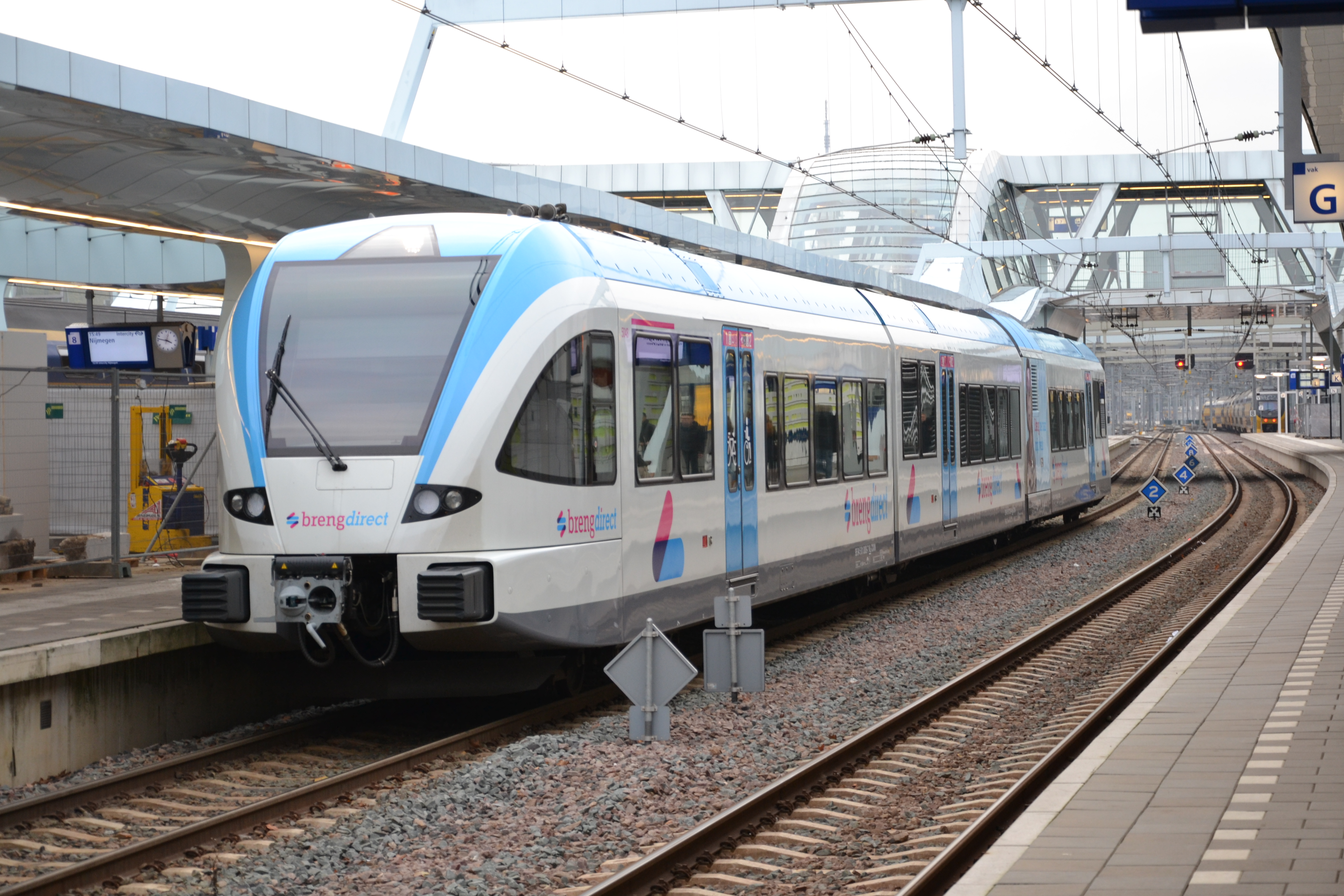 Breng GTW-treinstel 5048, na aankomst uit Doetinchem, op het station van Arnhem.